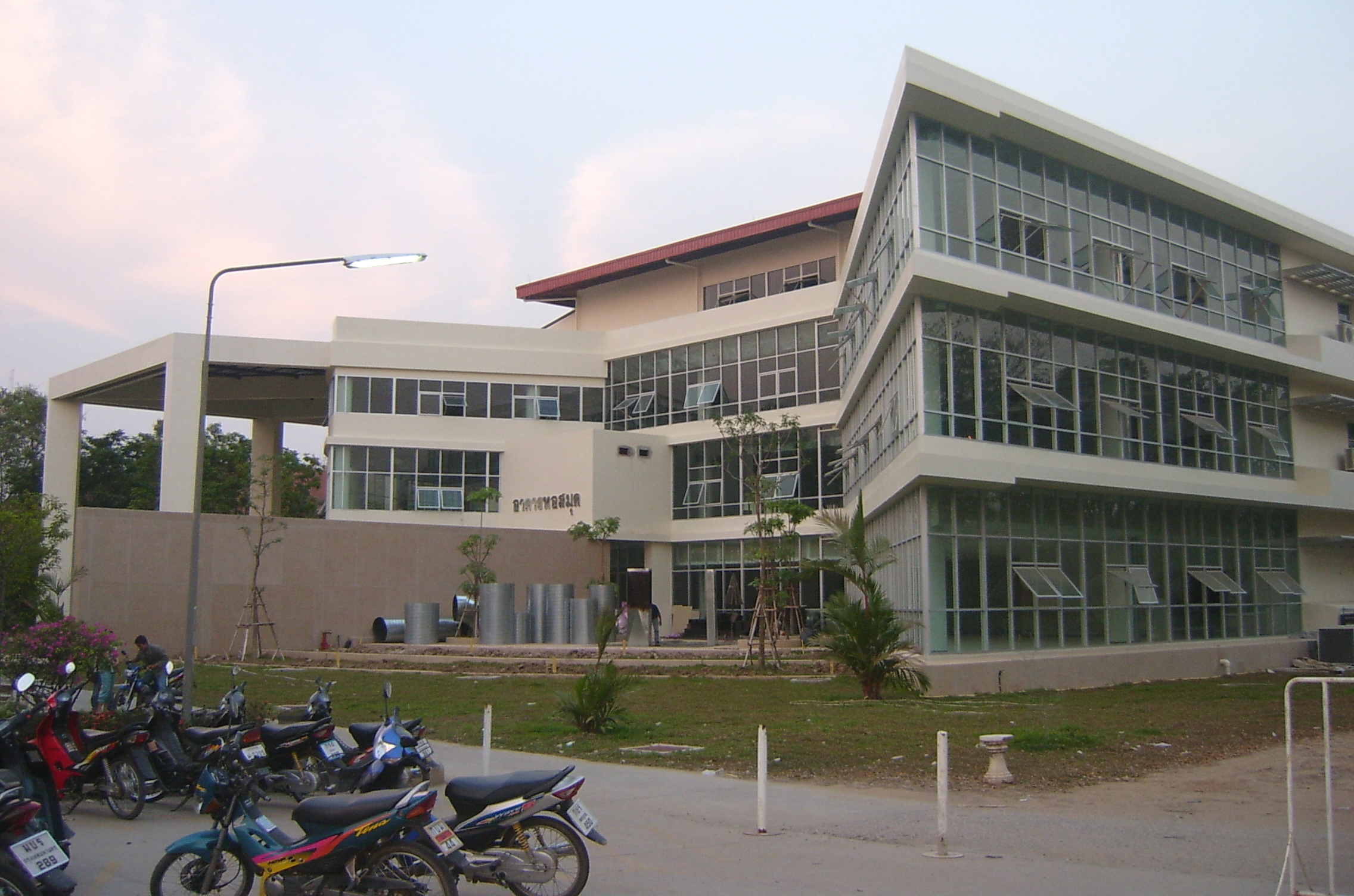 Atthakorn Jarusriwanna